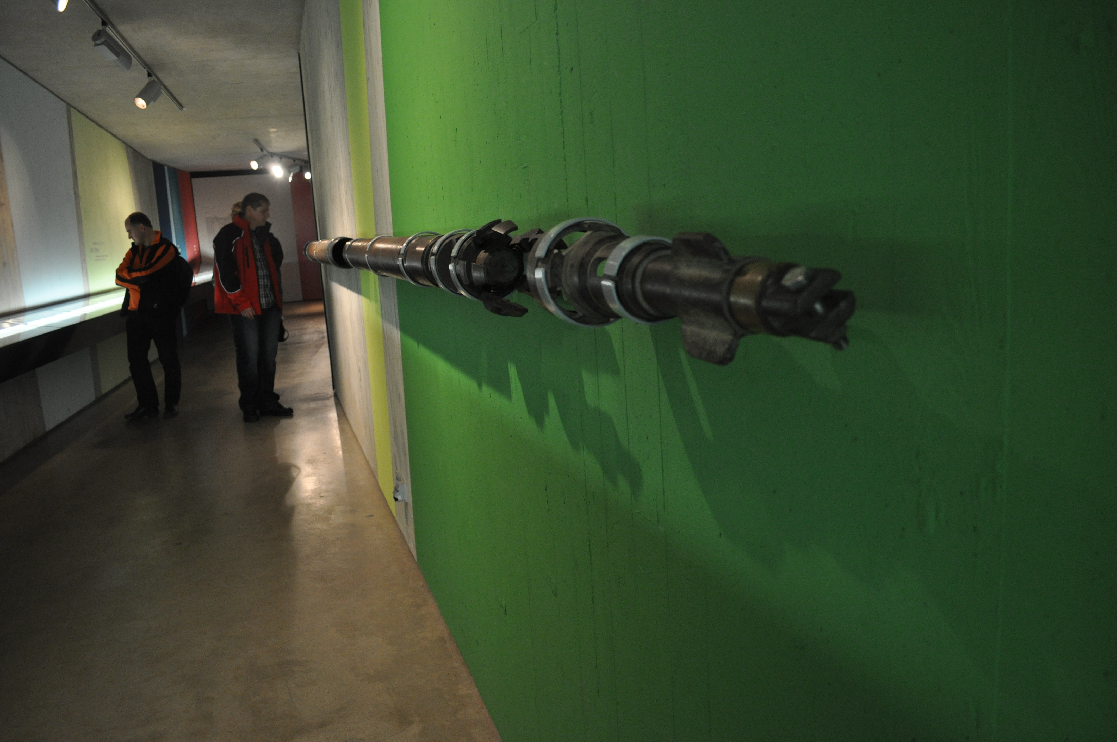 Exhibición de la sonda utilizada para las perforaciones en el yacimiento fosilífero de Messel. Muestra en la Casa del Visitante.